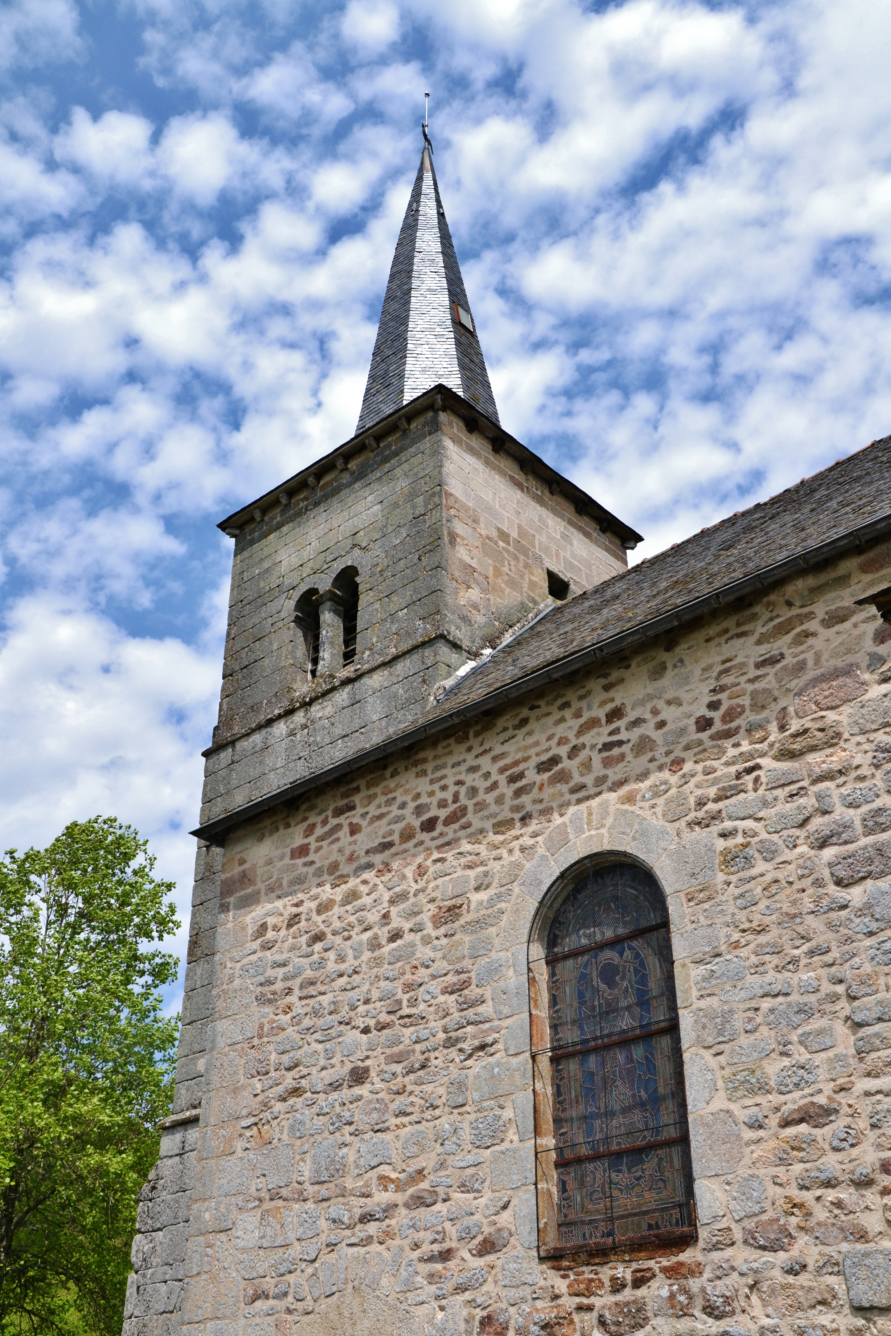 L'église de Davignac (Corrèze, France)